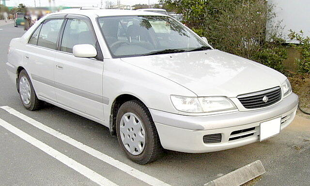 トヨタ・コロナプレミオ（後期型）